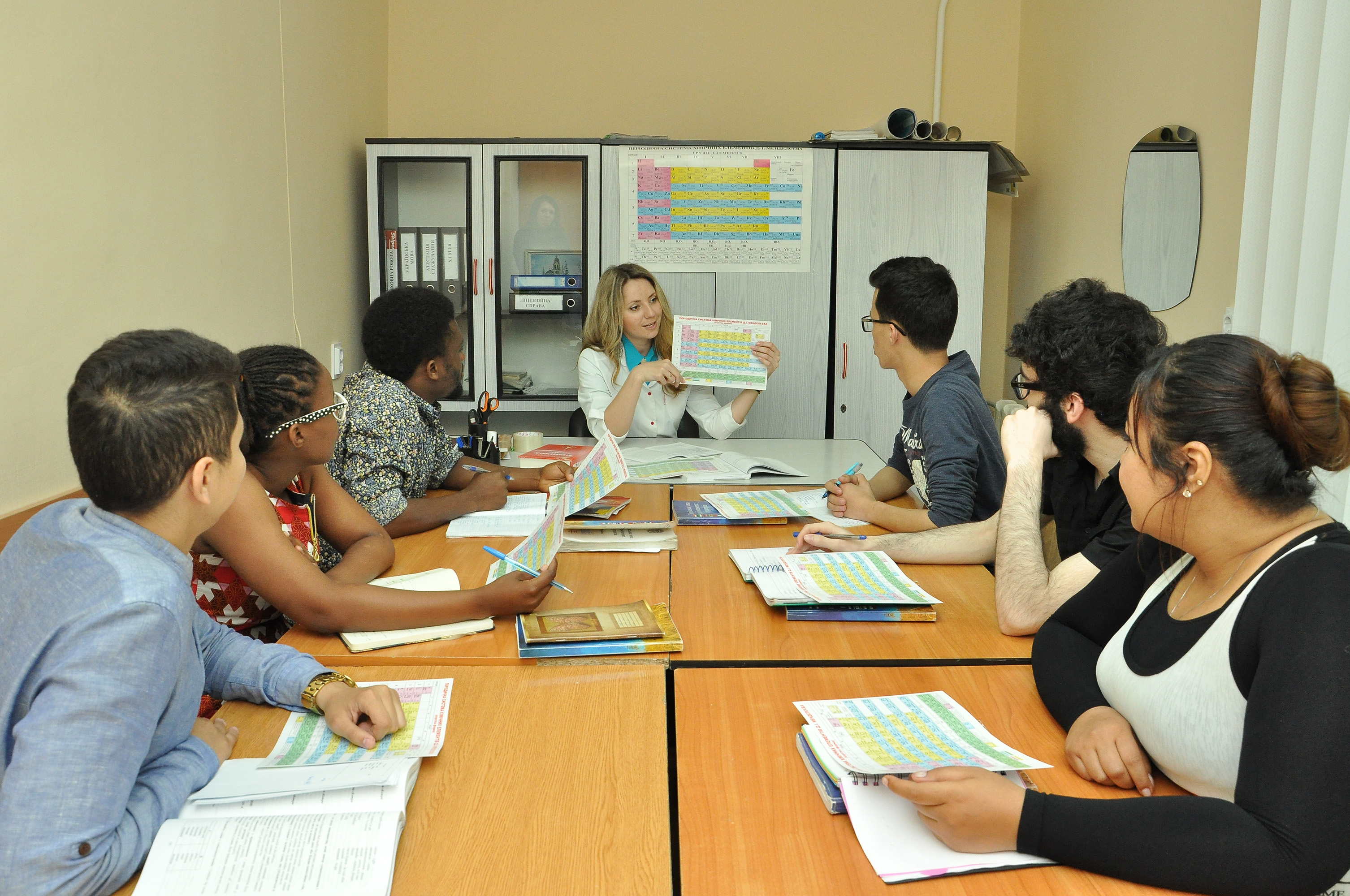 Підготовче відділення для іноземців та осіб без громадянства Тернопільського державного медичного університету імені І. Я. Горбачевського. Урок хімії проводить Оксана Тарасюк.